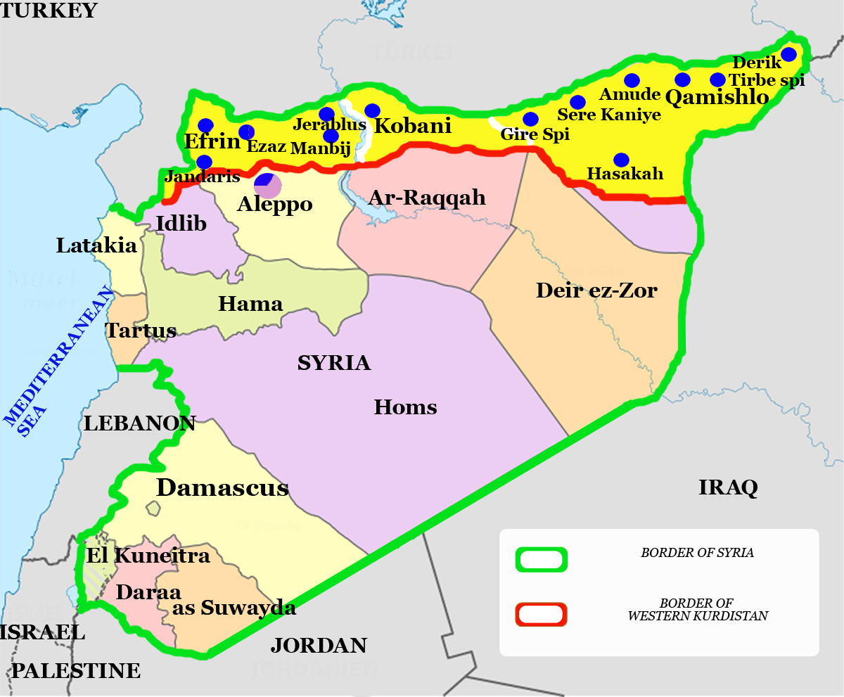 Карта Сирии и сирийского Курдистана. Граница курдского автономного образования определена на основании политических требований курдов Сирии. В сирийский Курдистан включены территории, фактически находящиеся под контролем курдских сил самообороны, и места, где курды составляют абсолютное или относительное большинство.